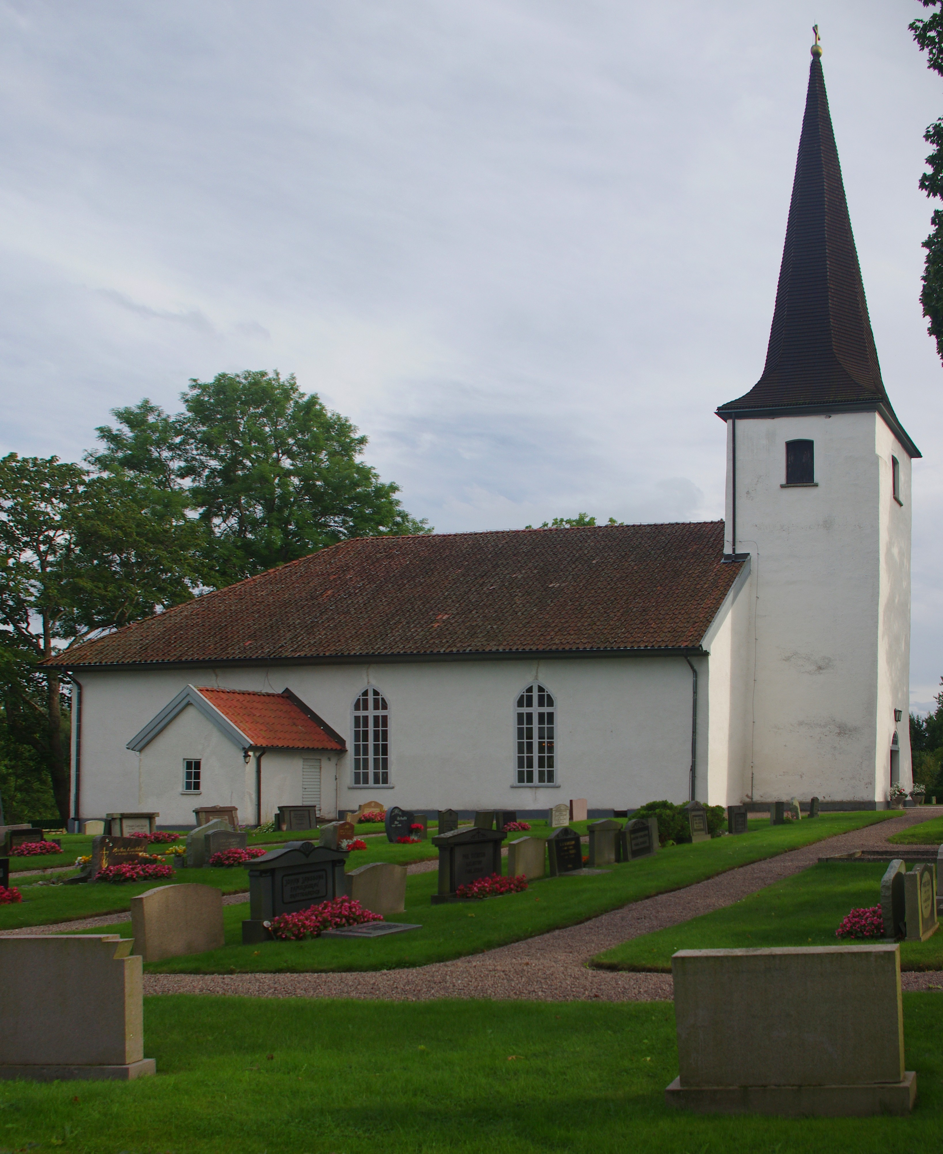 Fridene kyrka Fridene socken i Västergötland och Hjo kommun i Västragötalands län i Sverige.